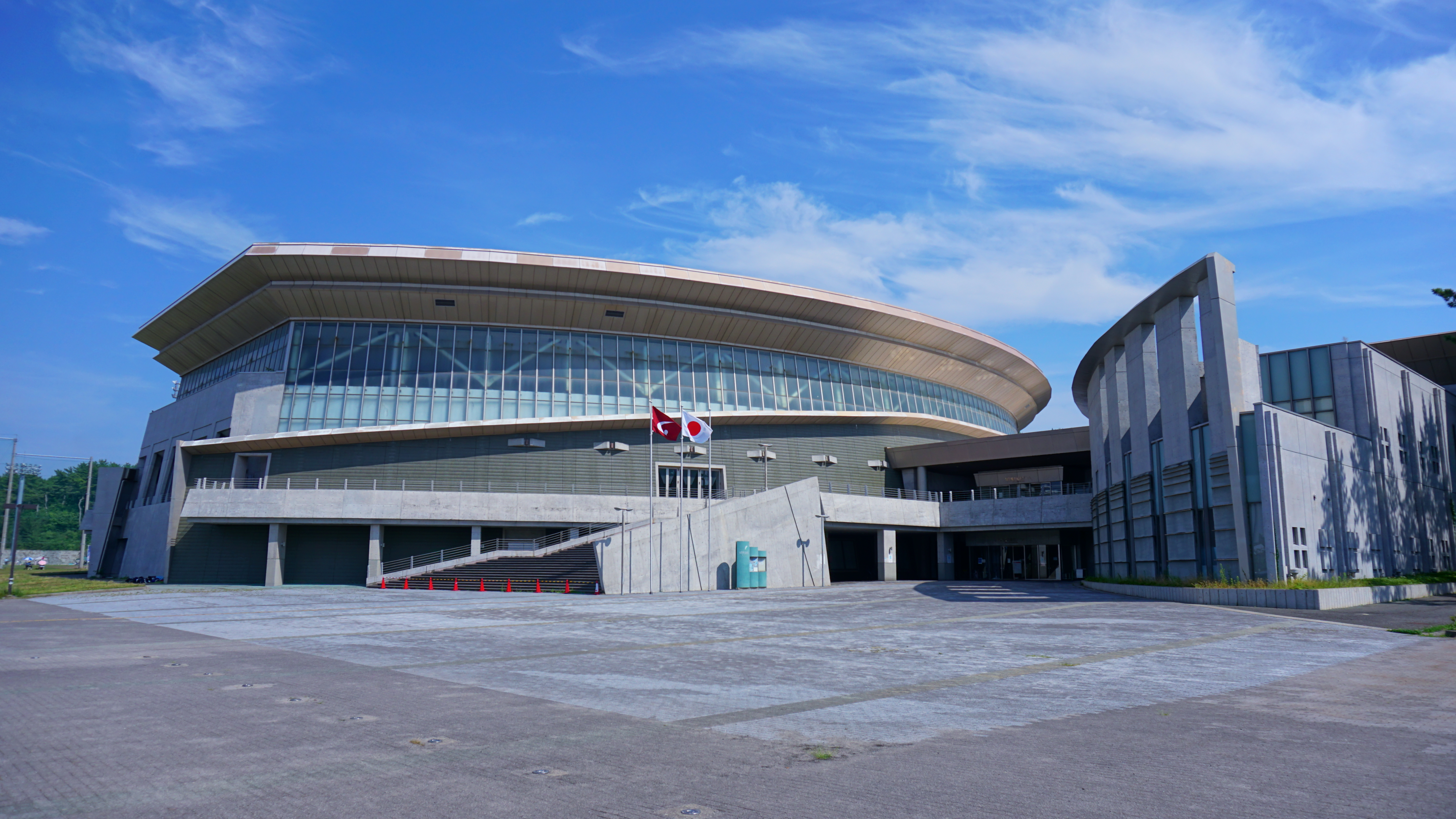 秋田県立総合プール（秋田市向浜）